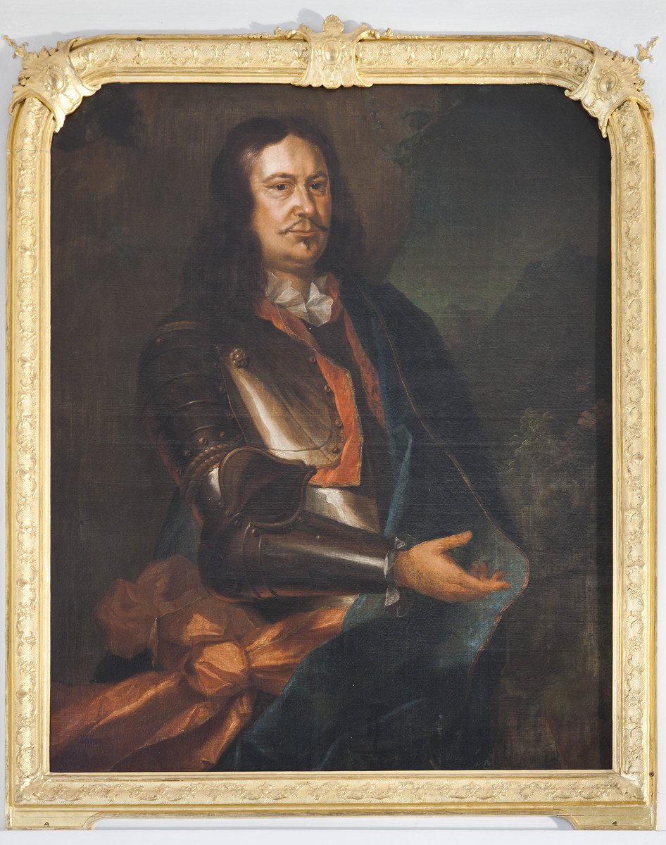 Bernhard von Plettenberg war der Vater des Fürstbischofs Friedrich Christian von Plettenberg, Erbauer von Schloss Nordkirchen. Das Gemälde befindet sich im dort im Ostflügel, östlicher Salon, Südseite.